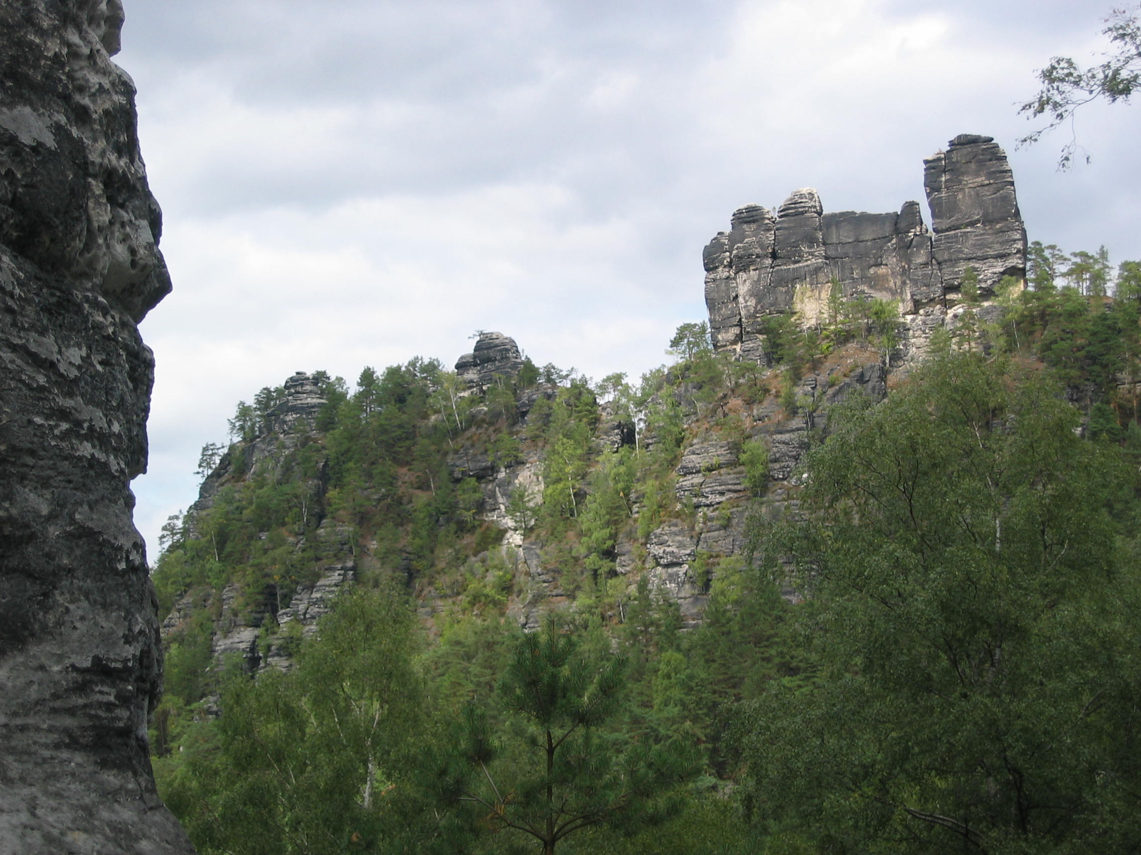 Felsen "Lokomotive" in Rathen, Sachsen